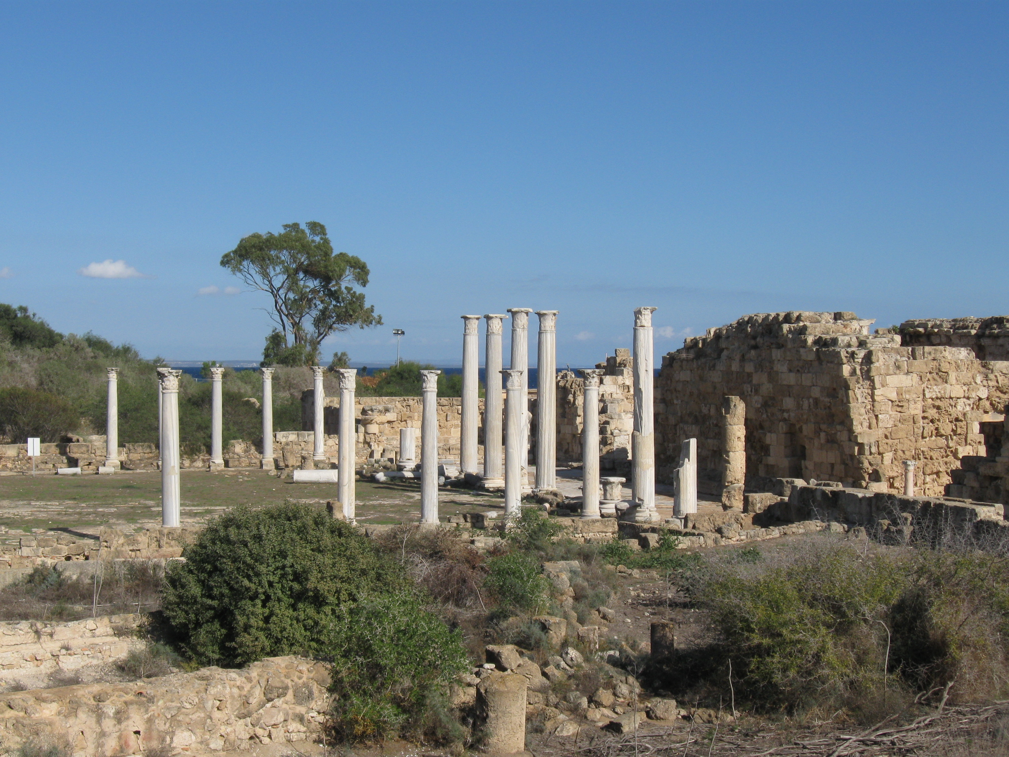 Salamis, Gymnasion und Therme aus Südwest